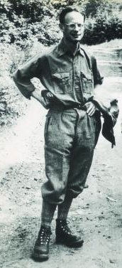 Depicted person: André Weil